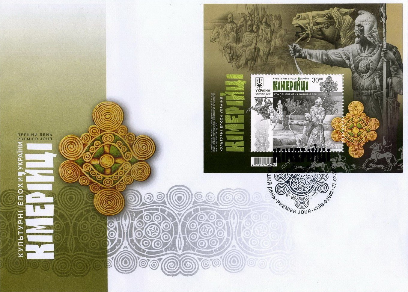 Кімерійці КПД С5 с/п Київ 2019